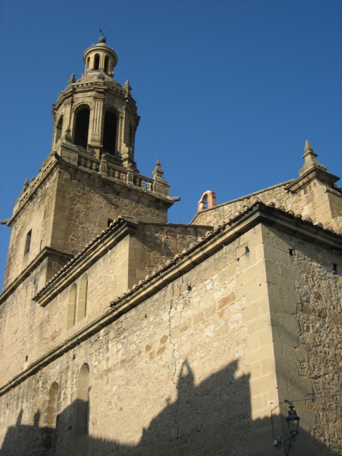 Iglesia de Rubielos de Mora